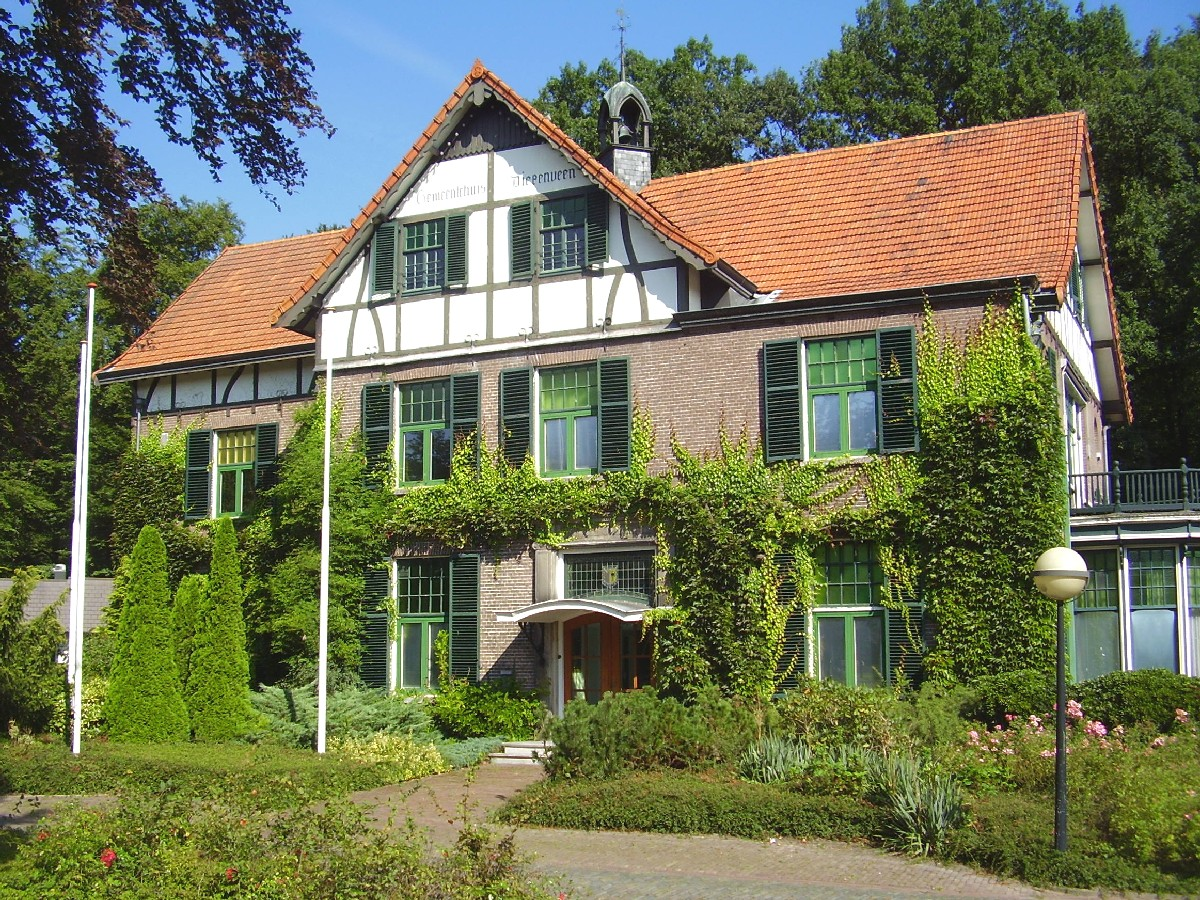 Voormalige gemeentehuis van Diepenveen in Schalkhaar, Nederland / the Netherlands